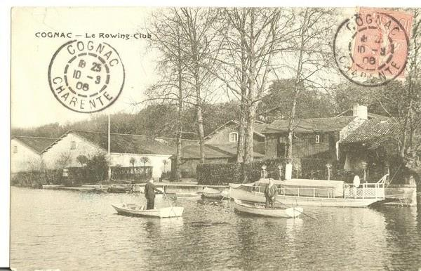 carte postale de 1906 du club d'aviron de Cognac, Charente, France